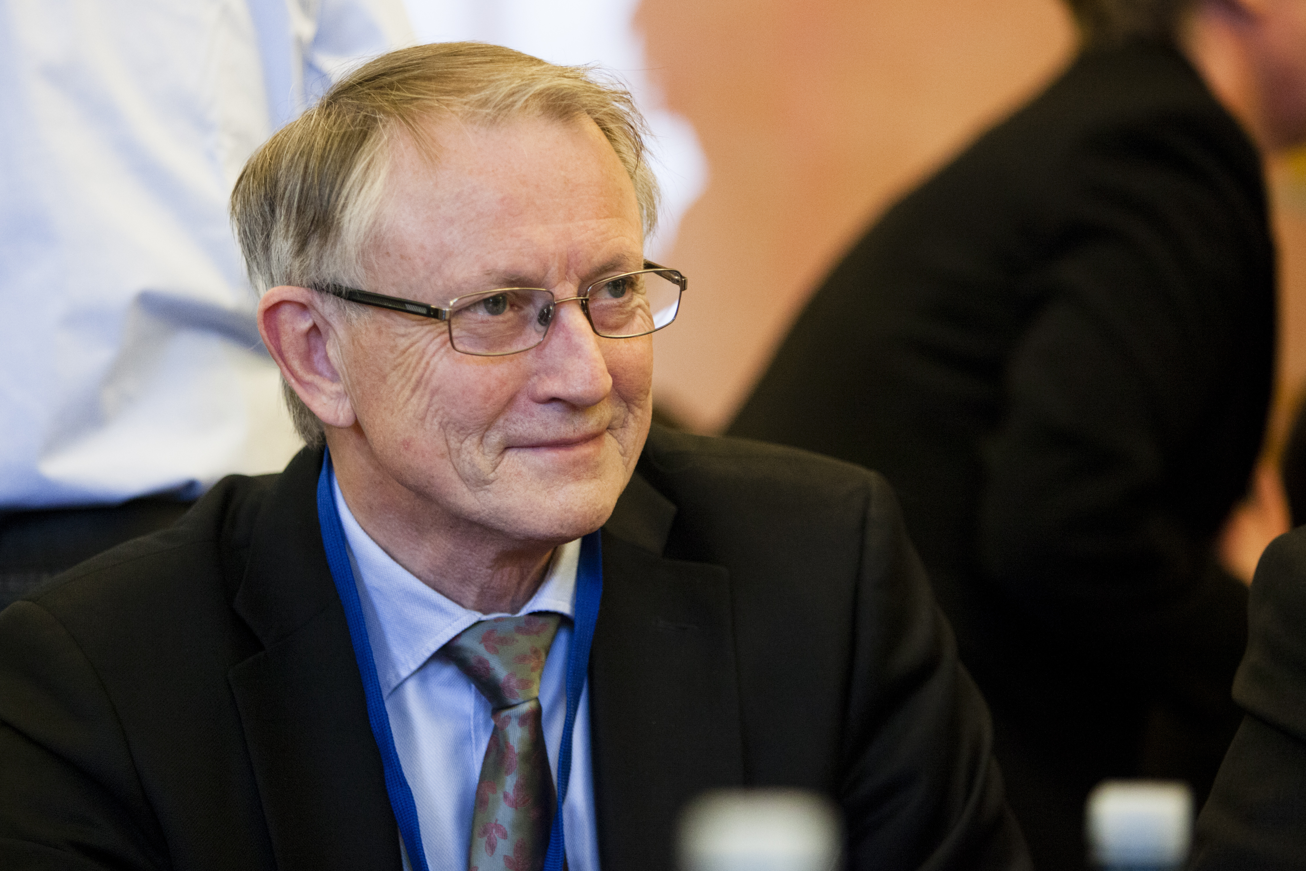 MR-U 02/12 Möte i ministerrädet for utbildning och forskning i förbindelse med Nordiska rädets 64:e session i Helsingfors. Arvid Hallén.